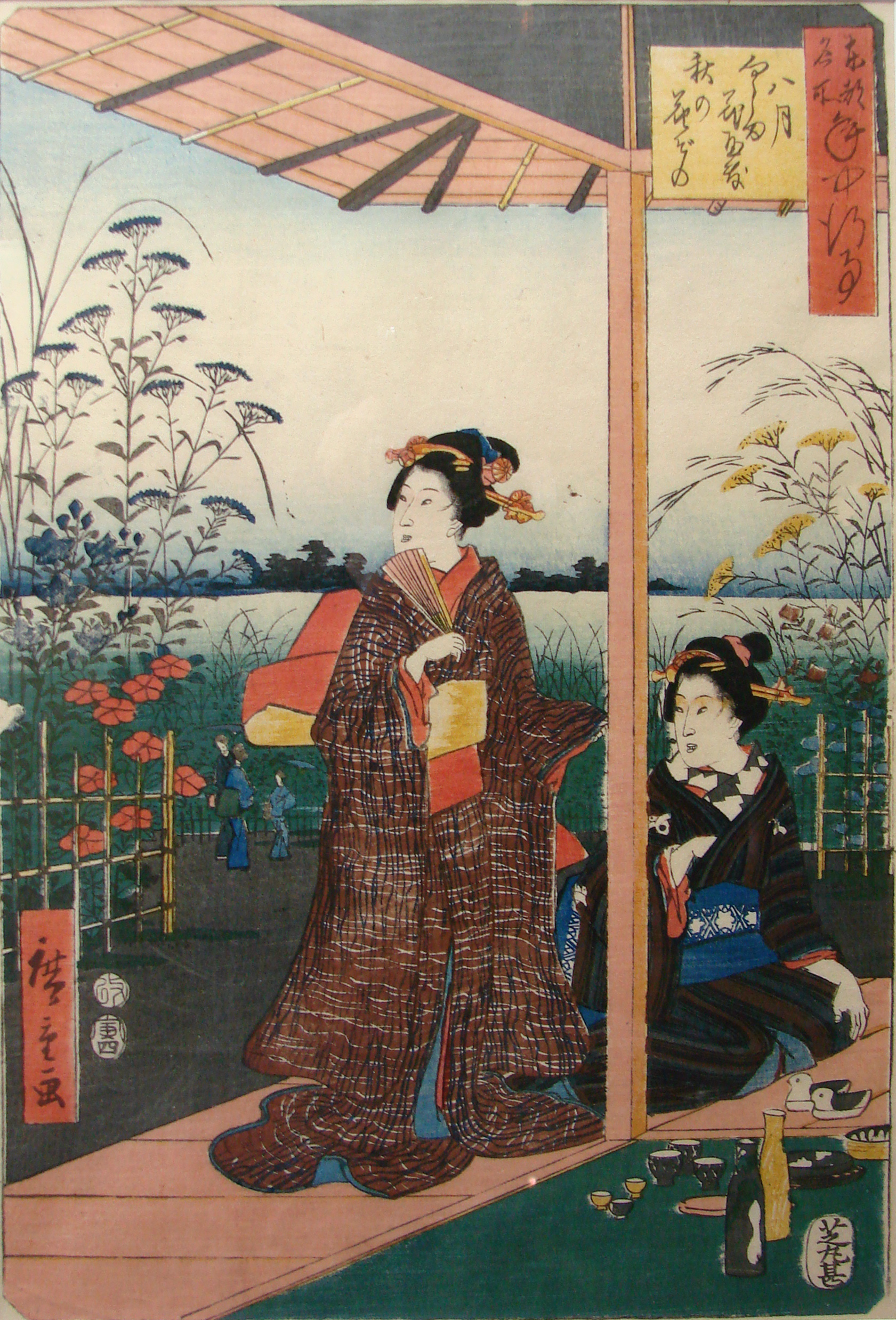 Illustration du Genji Monogatari, 19ème siècle. Musée Saint-Remi à Reims.